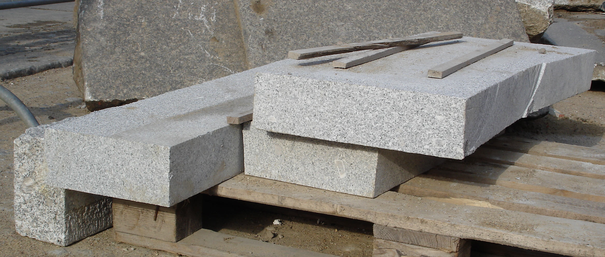 Berlin: Charlottenburger Platten (moderner Typ)